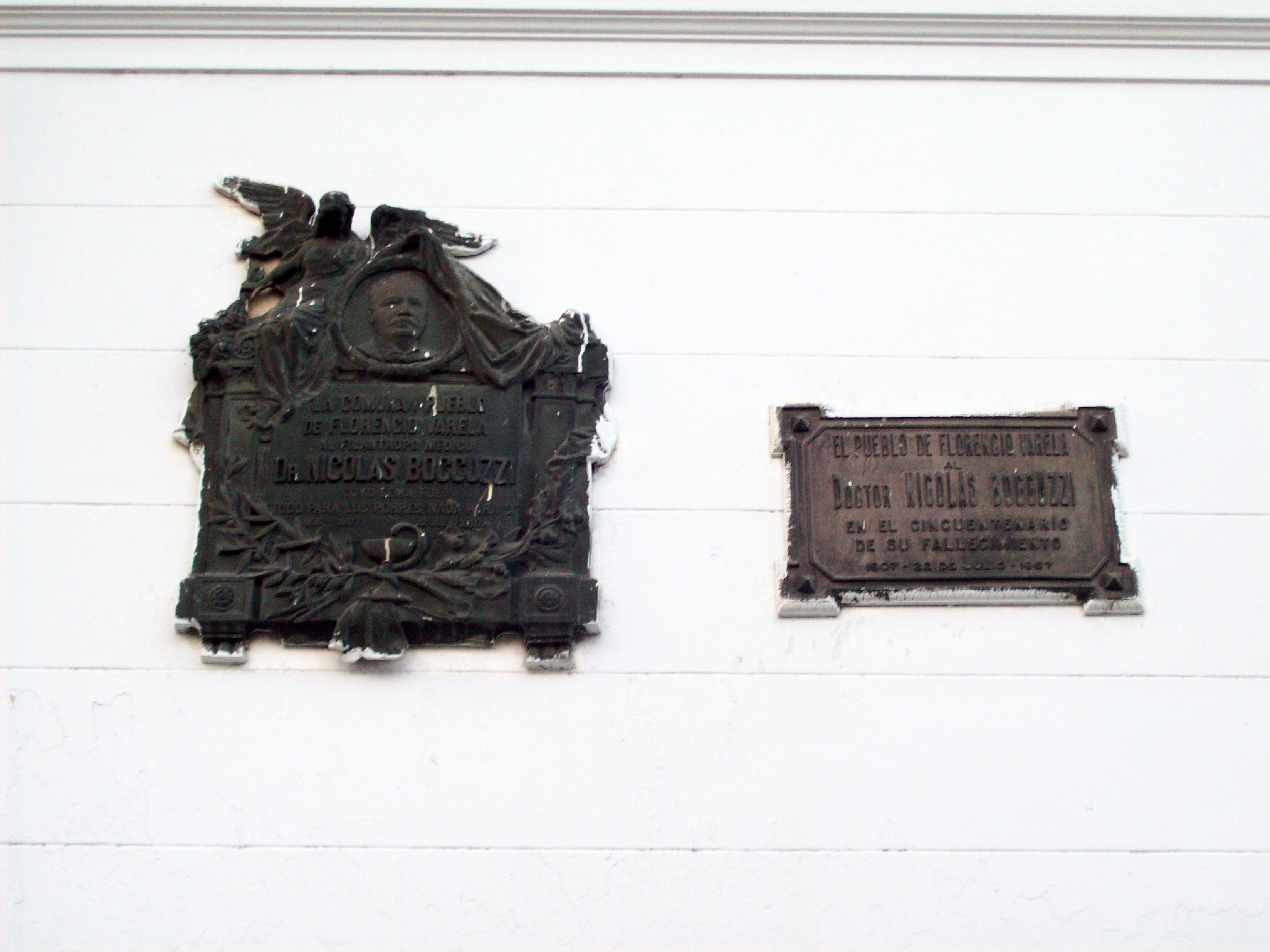 Placas en la escuela Sarmiento en homenaje al Doctor Nicolas Bocuzzi.